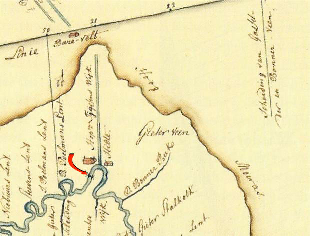 Detail van een kaart van de Hunze of Oostermoerse Vaart nabij Gieterveen